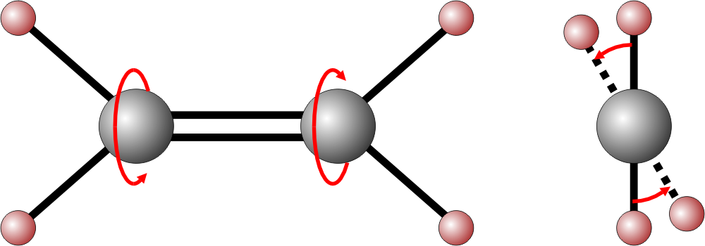 Torsionsschwingung eines Ethylen-Moleküls